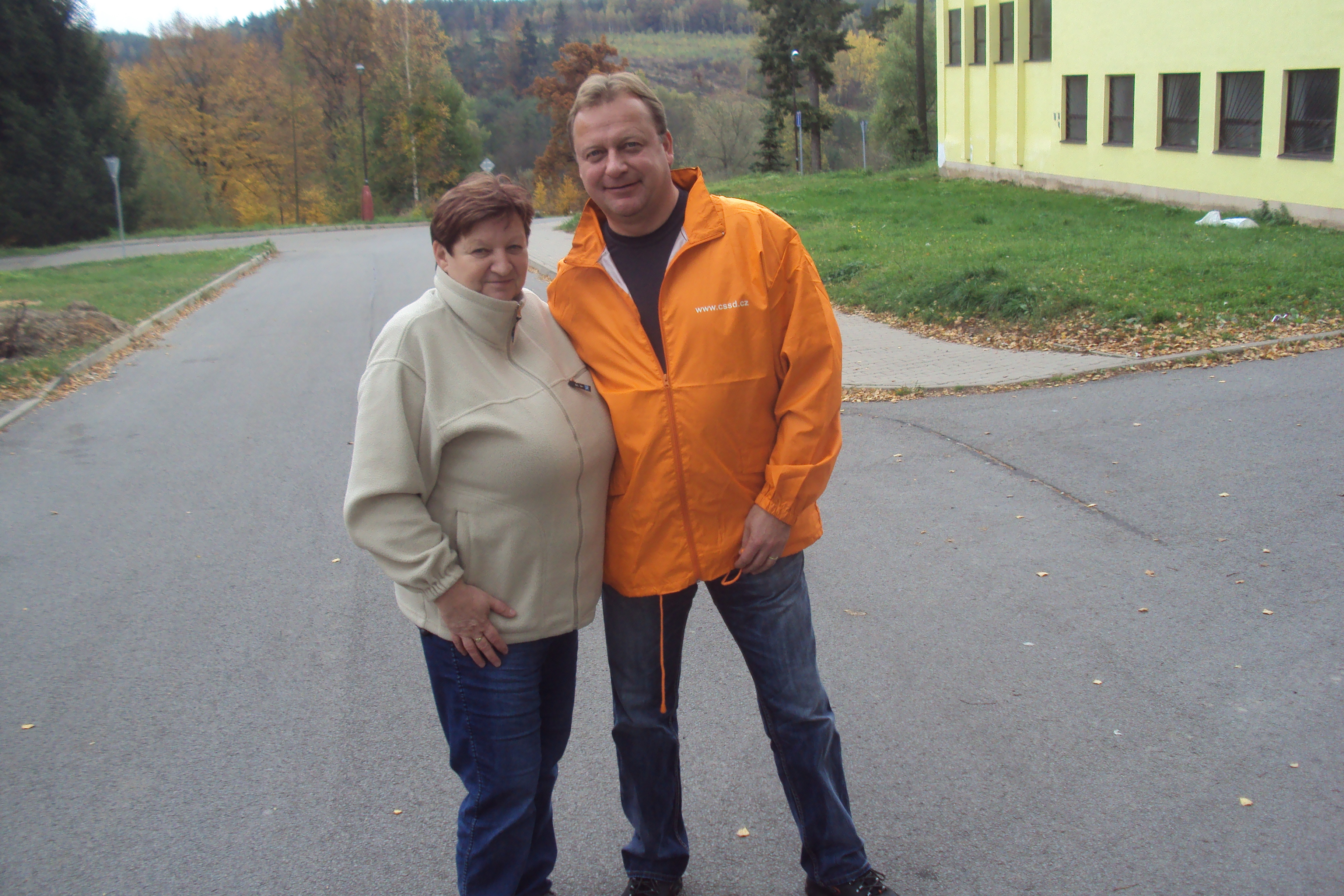 Kandidáti ČSSD Pavel Ploc a Sylva Moravcová v Nových Zákupech, předvolební turné v říjnu 2013